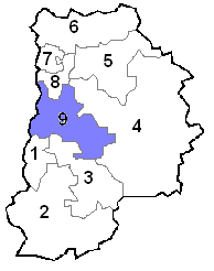 Carte de la Seine-et-Marne montrant la neuvième circonscription législative